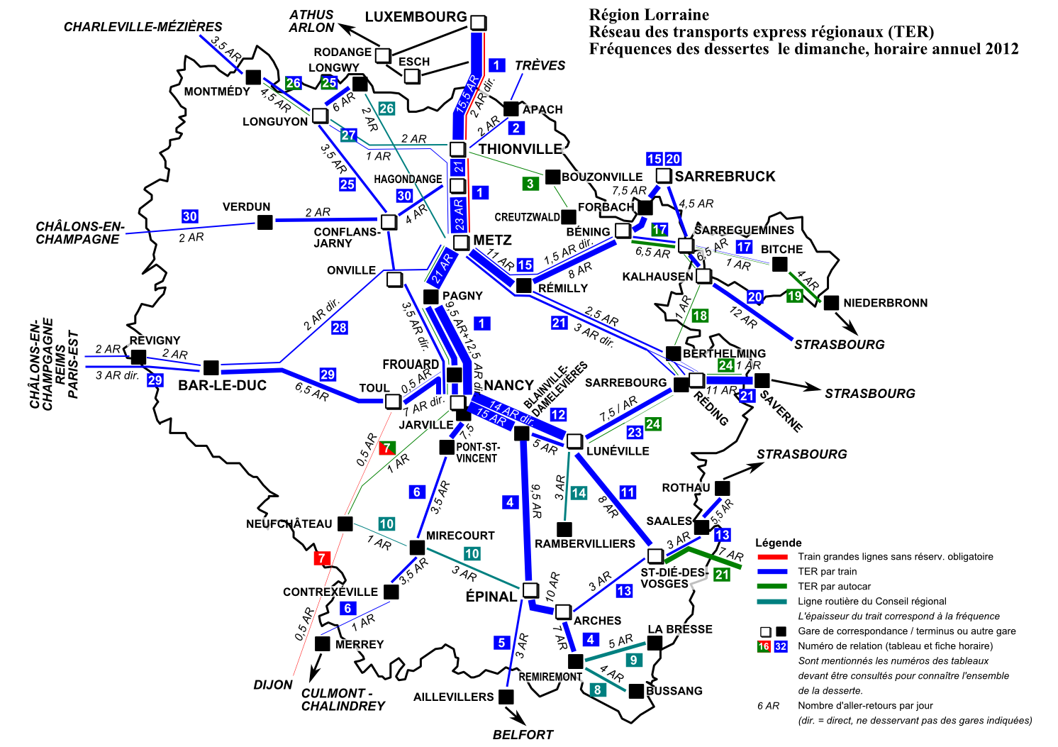 TER Lorraine, fréquence de la desserte le dimanche, horaire annuel 2012.